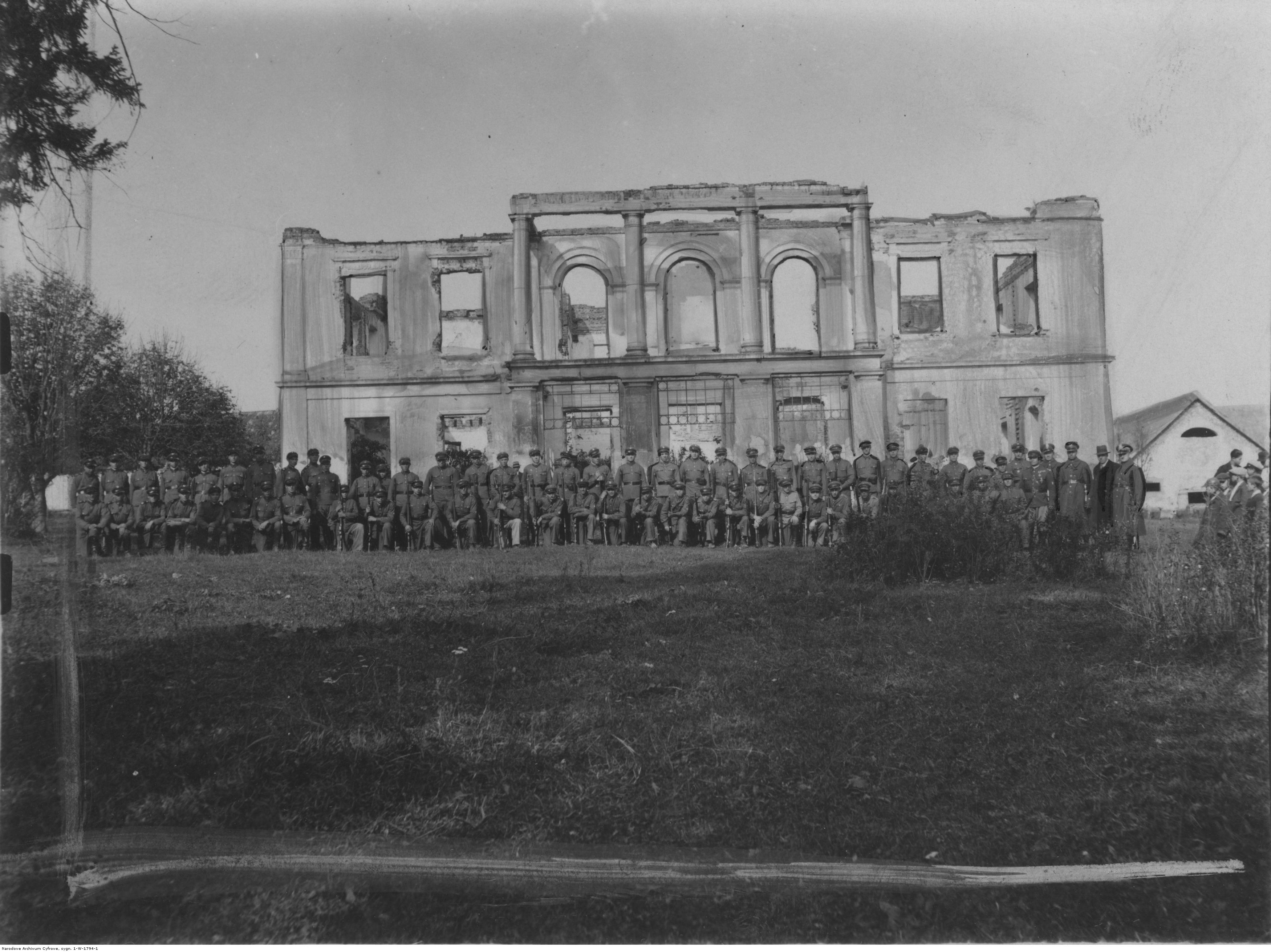 Uroczystości X-lecia istnienia Korpusu Ochrony Pogranicza w kompanii KOP stacjonującej w Turylczu. Fotografia grupowa kompanii strzelców na tle ruin zamku w Turylczu; 1934 r. Koncern Ilustrowany Kurier Codzienny - Archiwum Ilustracji. Sygnatura: 1-W-1794-1